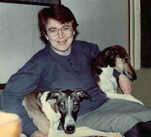 Yelena Yefimova